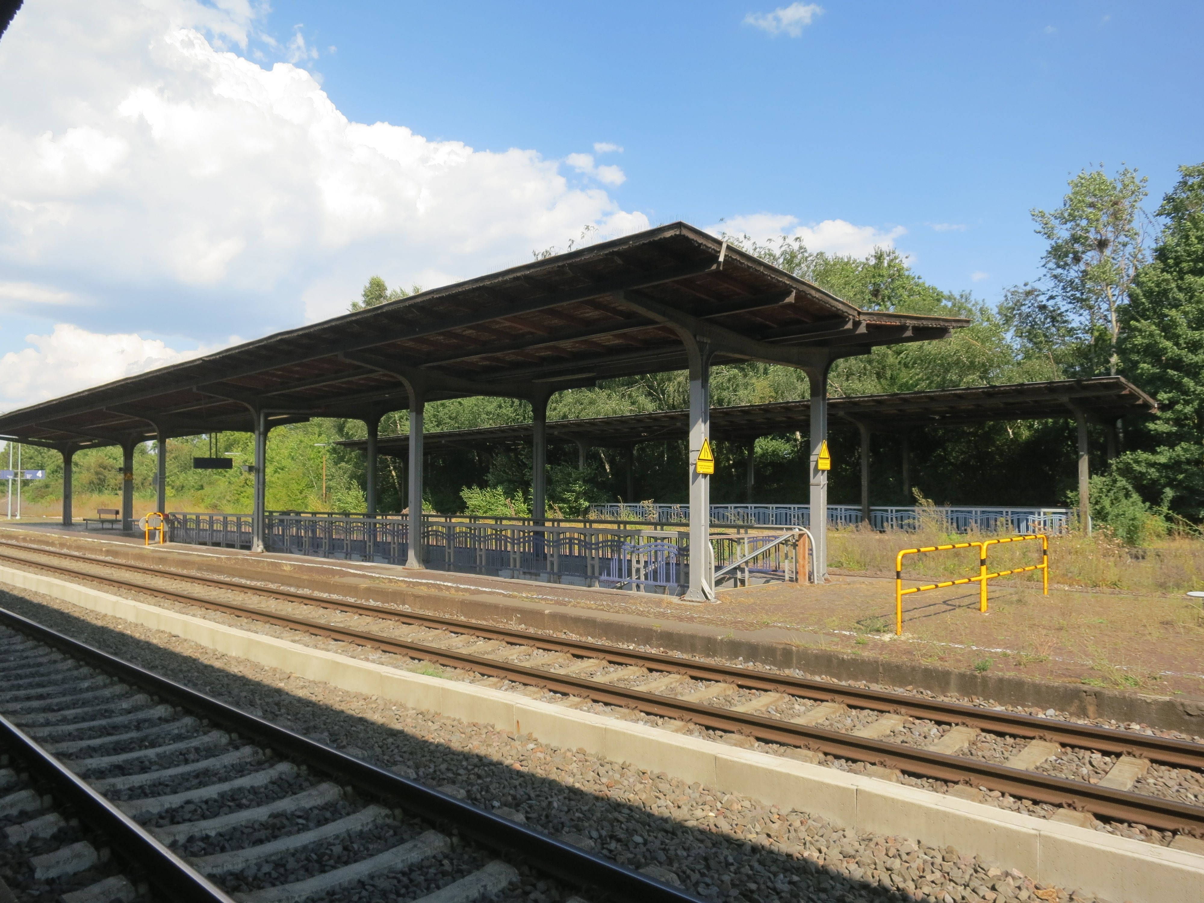 Bahnhof Gensingen-Horrweiler. Kulturdenkmal. Bahnsteigdächer